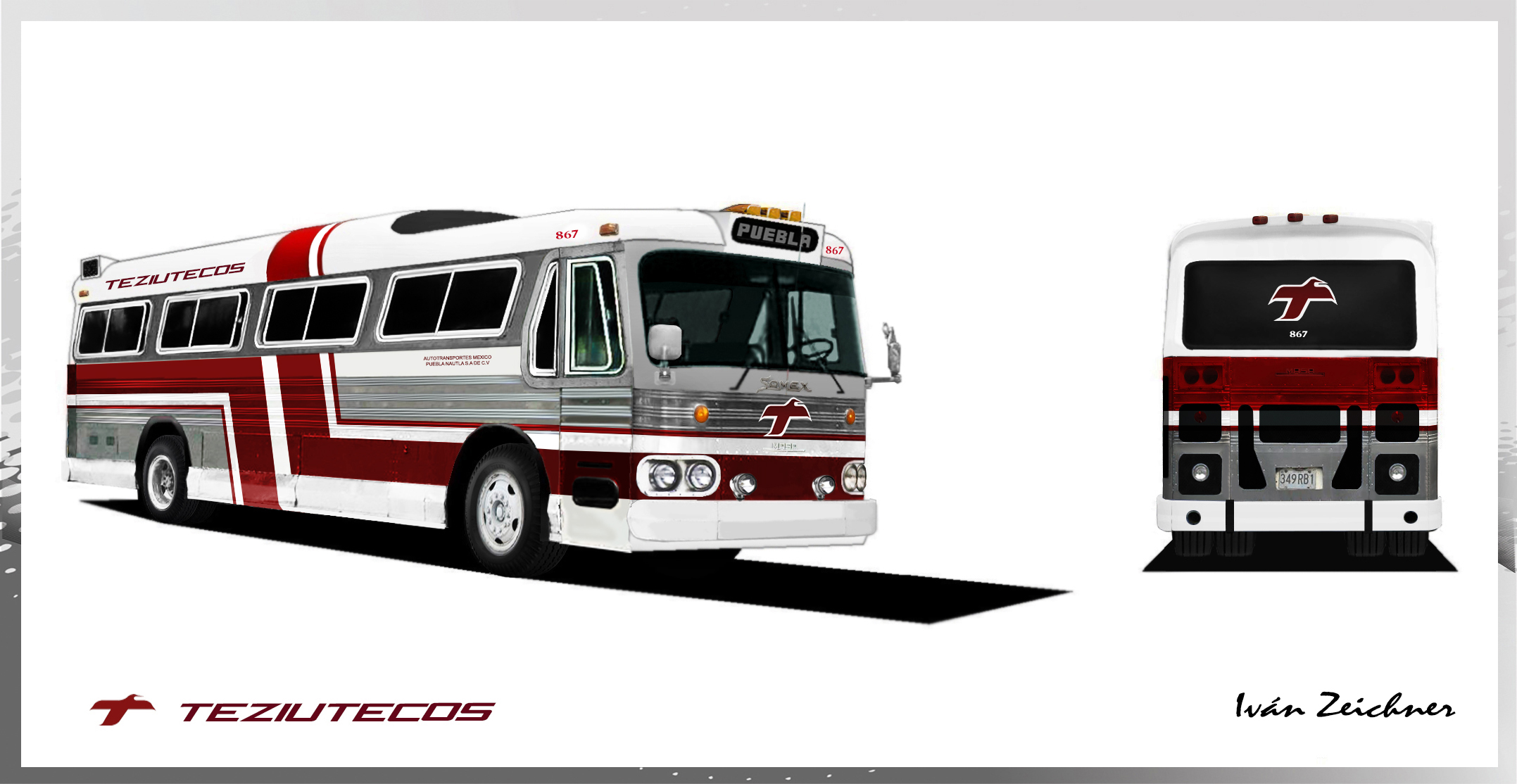 Dibujo de un Autobús MASA Somex 2030 (1980) de Autotransportes Teziutecos.